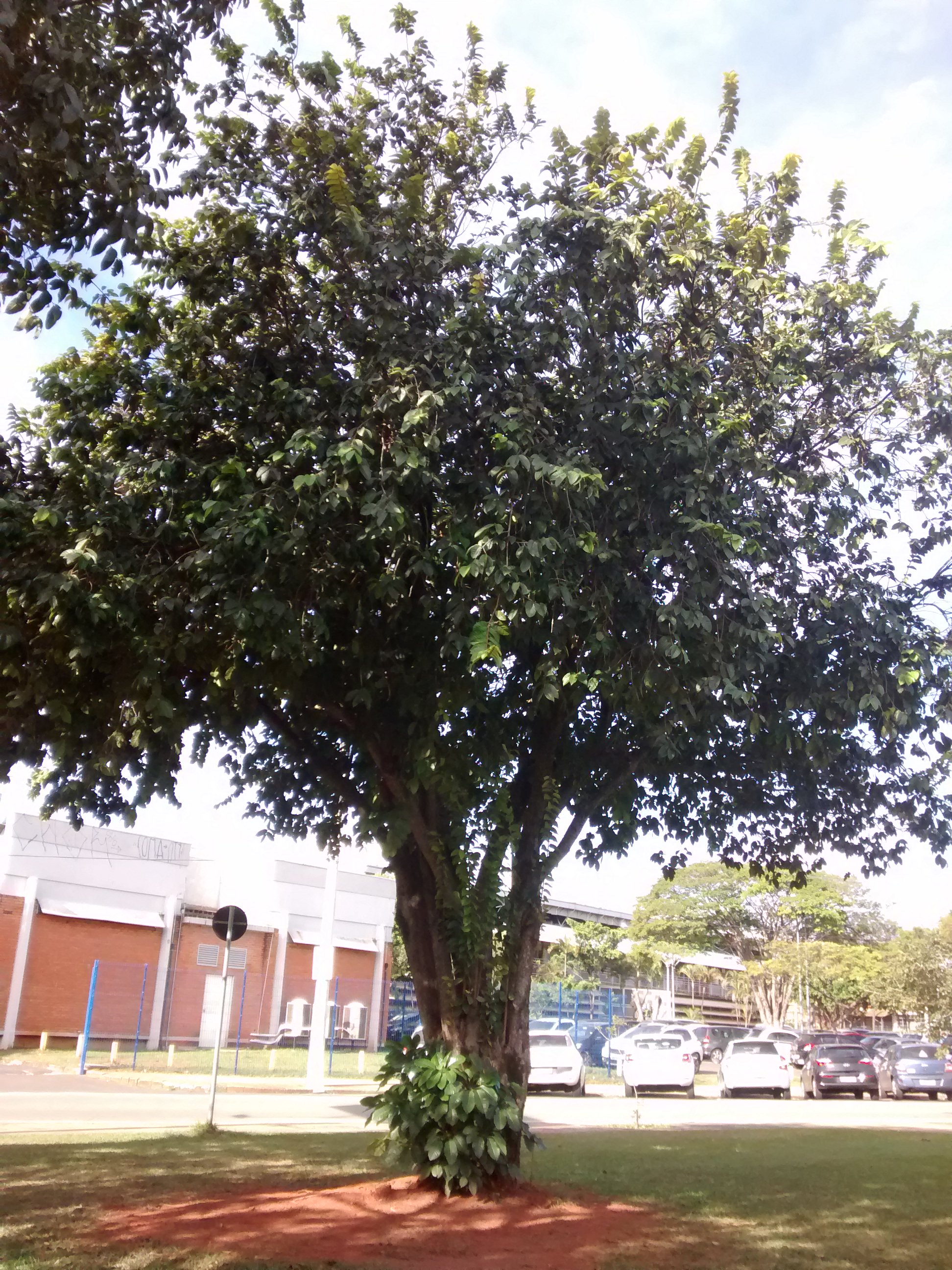 Hirtella hebeclada